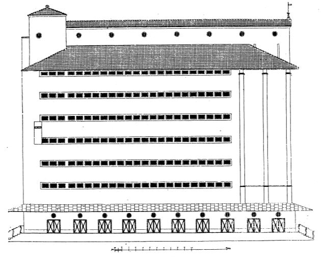 Ritning till lagerhuser i Vara, 1917